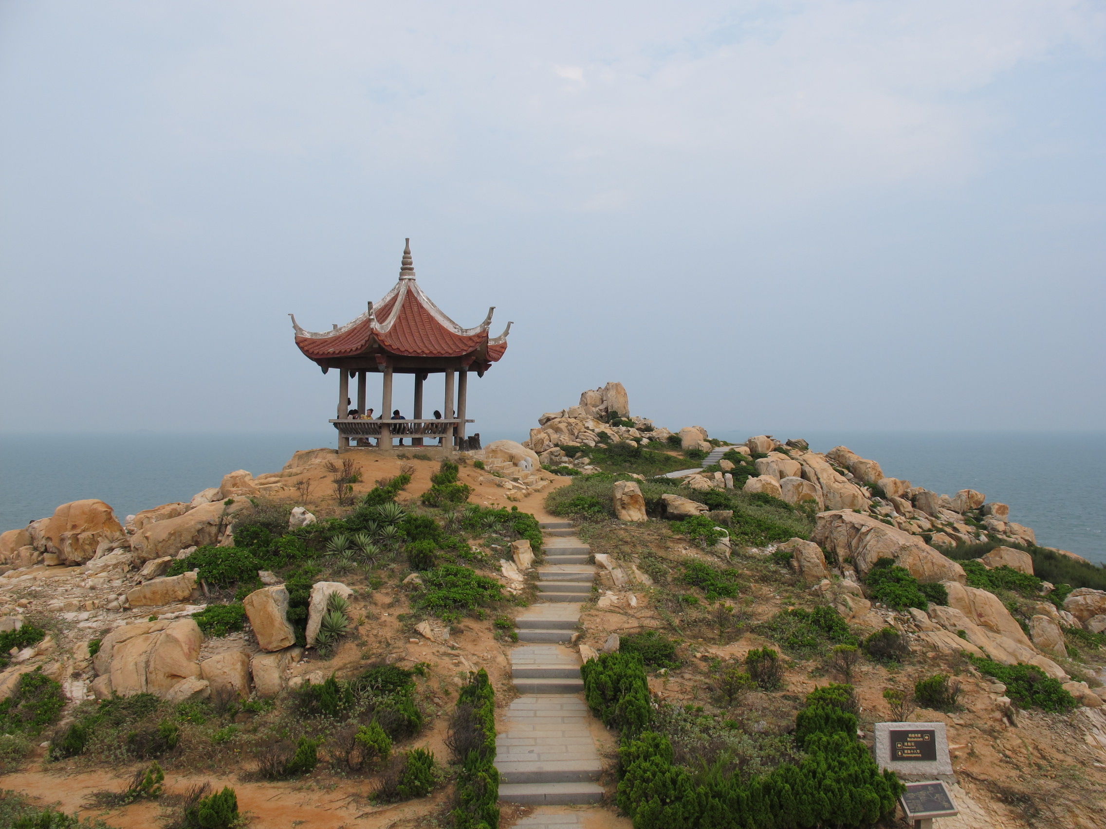 湄洲岛神石园风光